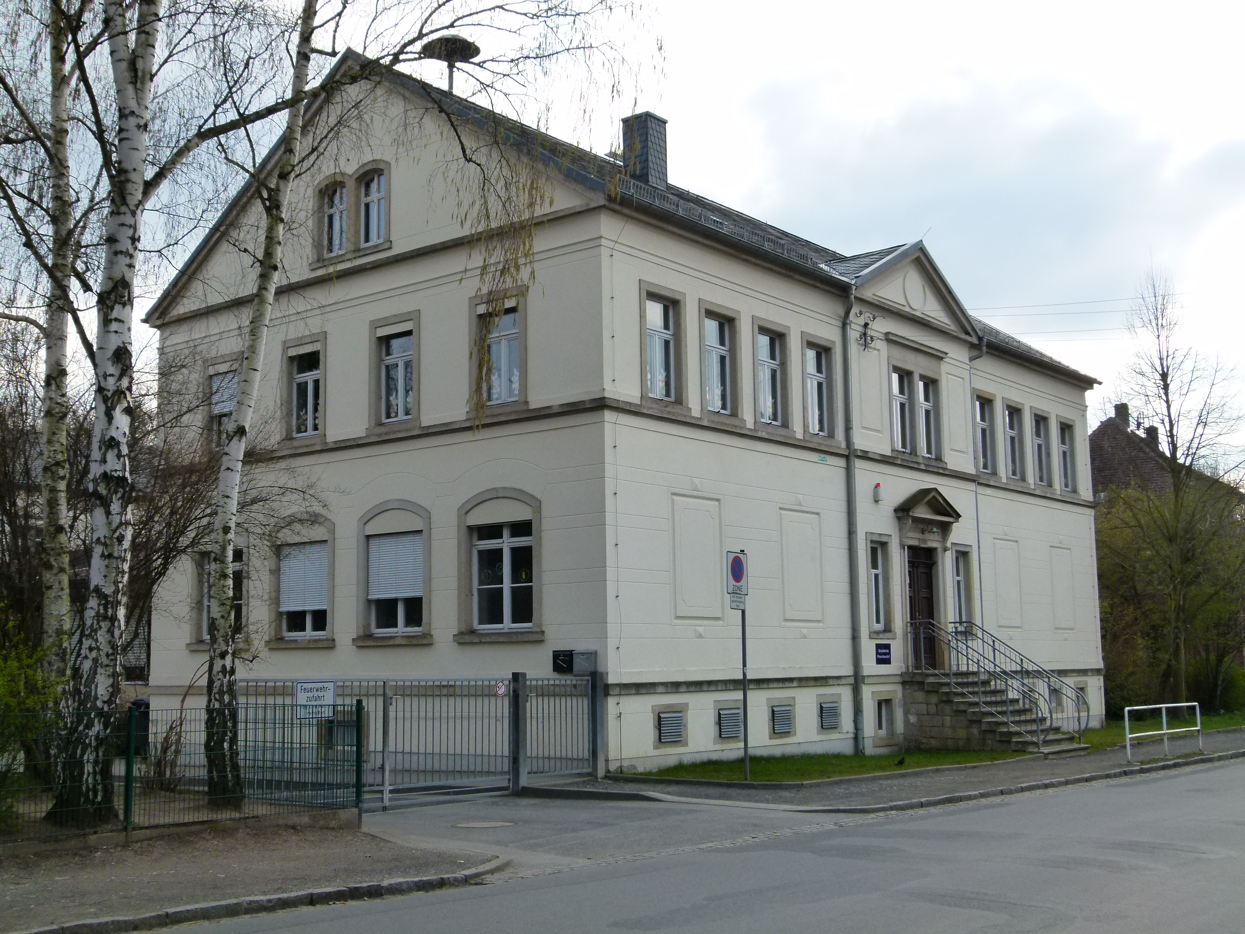 Denkmalgeschützte Schule, Altneundorf 24, Pirna, Sachsen